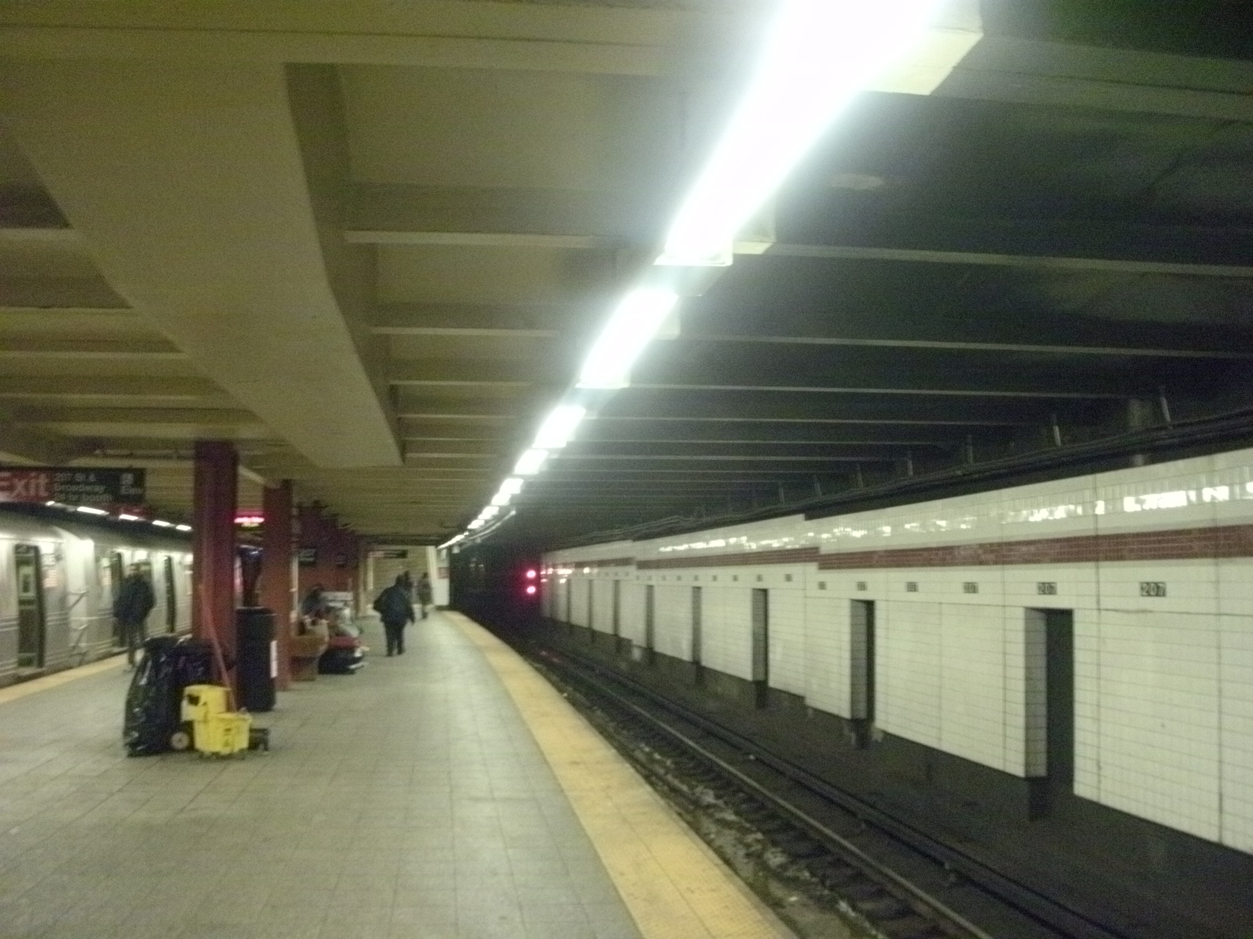 Ge digital camera